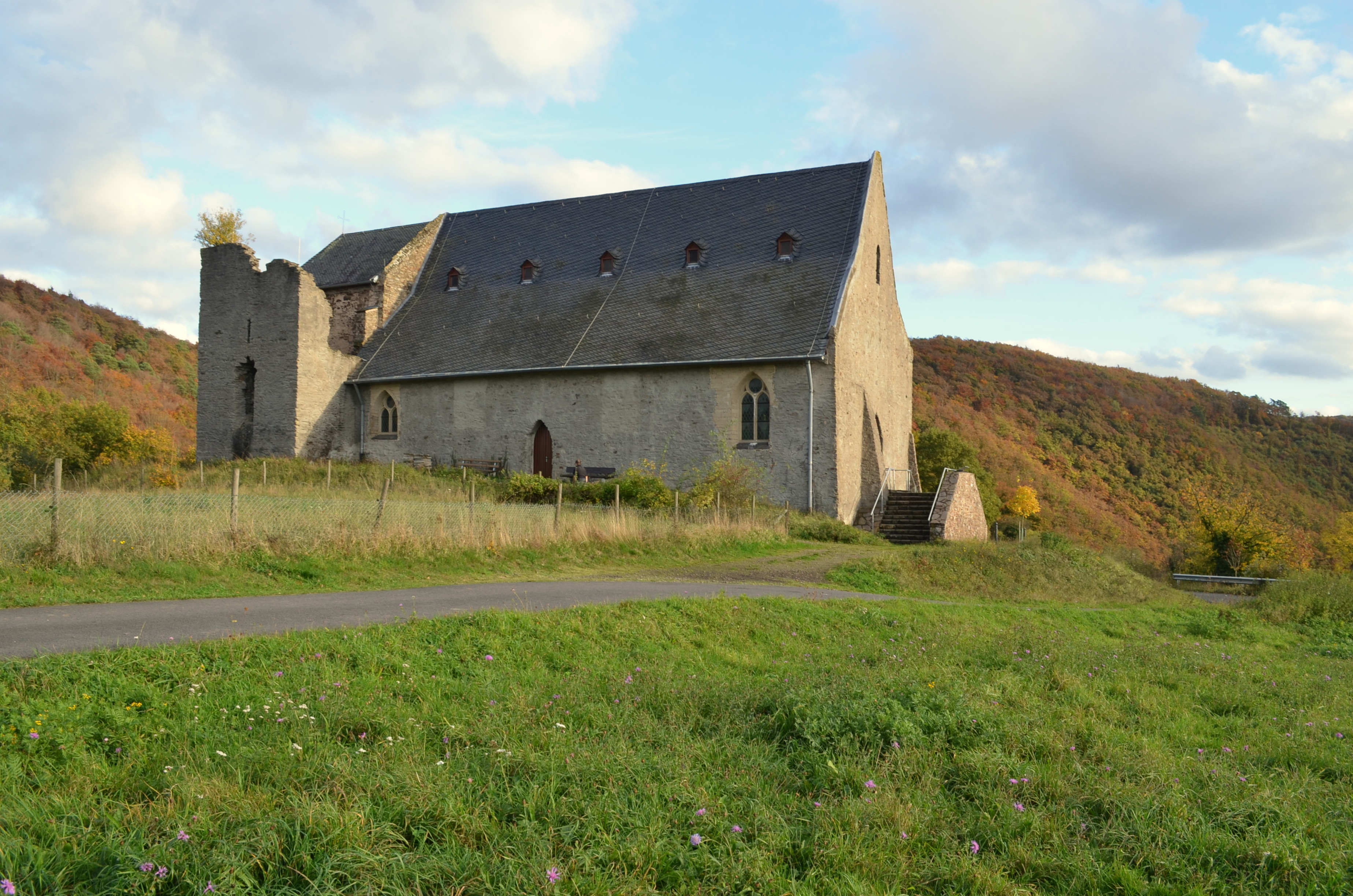 ཇོང་ཁ: Oberfell, Bleidenbergkapel van de Hl. Drievuldigheid (noordzijde met torenruïne)